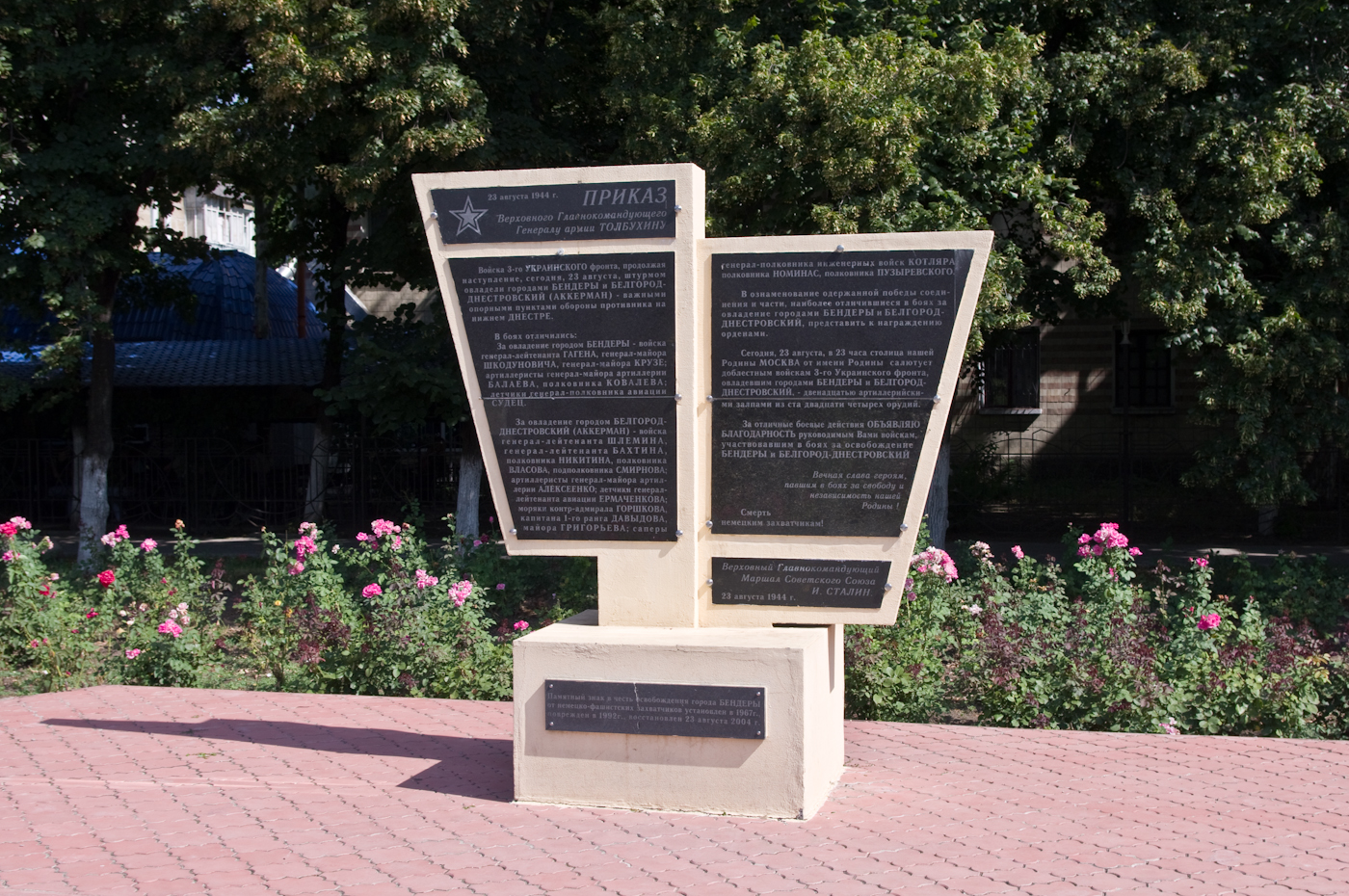 Приказ Сталина генералу армии Толбухину в виде памятника, установленный в центре города Бендеры.